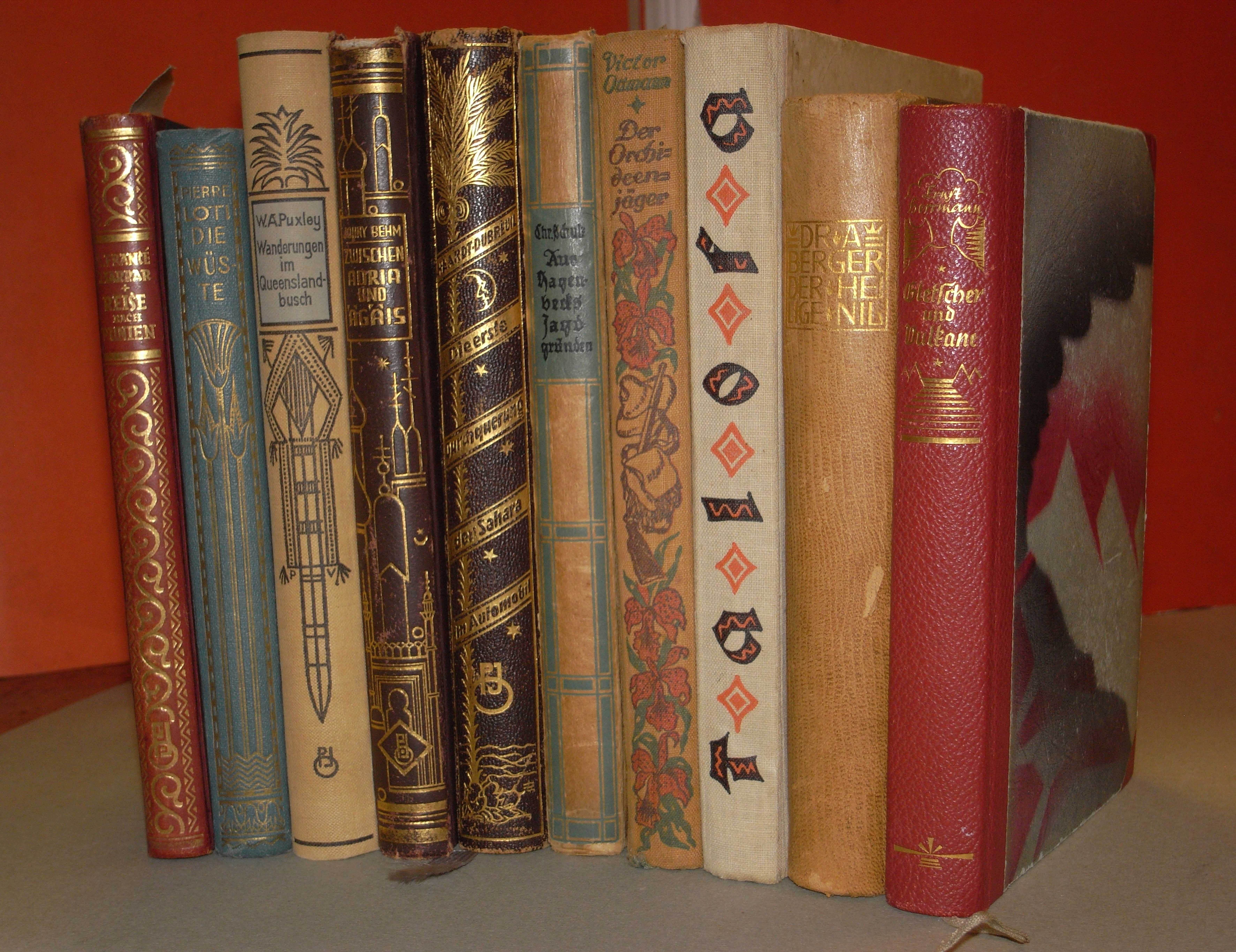 Rückentitel von Büchern (Einbandgestaltung)